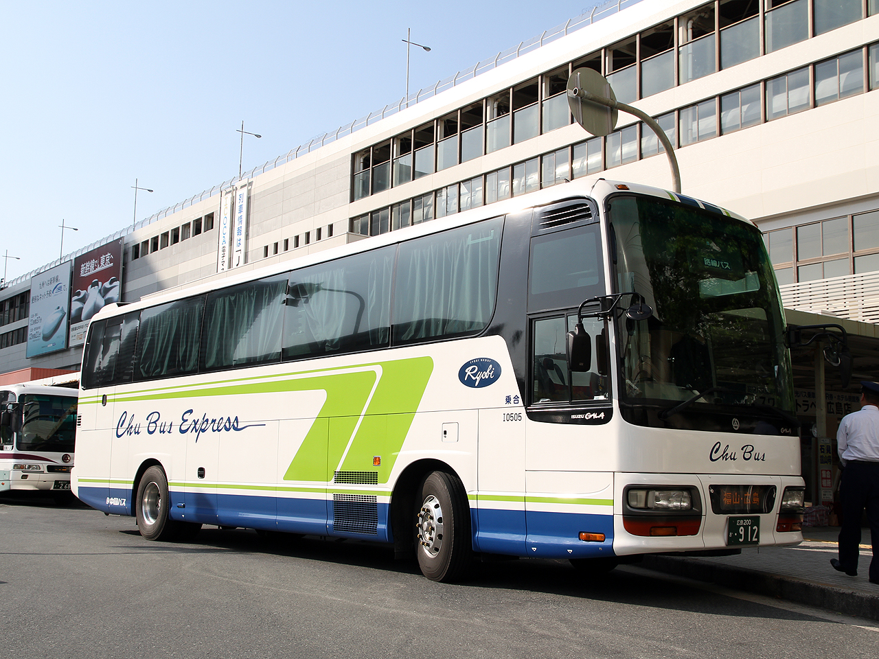 登録番号 広島200か・912 中国バス㈱広島営業所所属 「メイプルハーバー」専用車両 2012年5月 広島駅新幹線口にて撮影 撮影者 Zondag2000